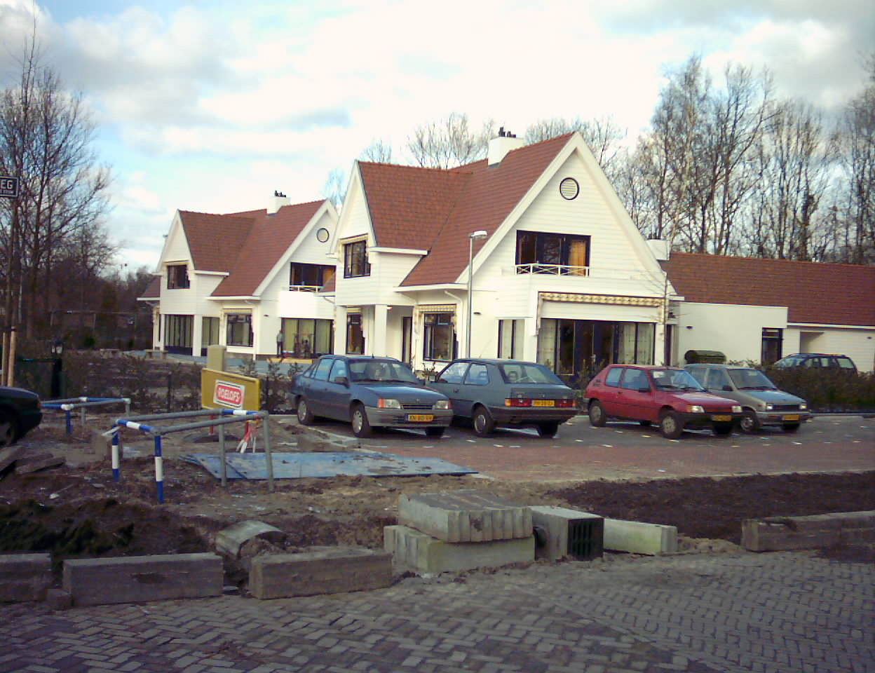 Mappa Mondo kinderhuis in Rijswijk, 2003